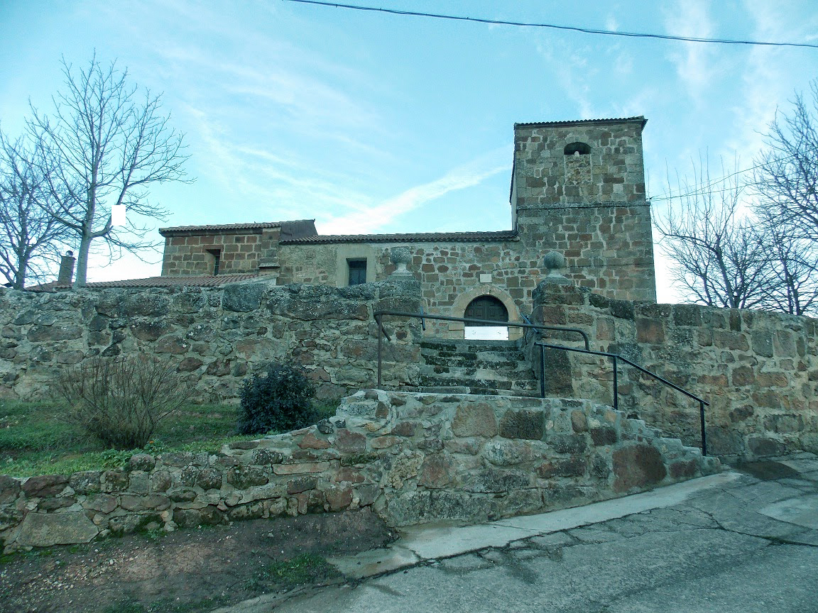 Iglesia del pueblo Terrazas, situado en la Sierra de la Demanda.